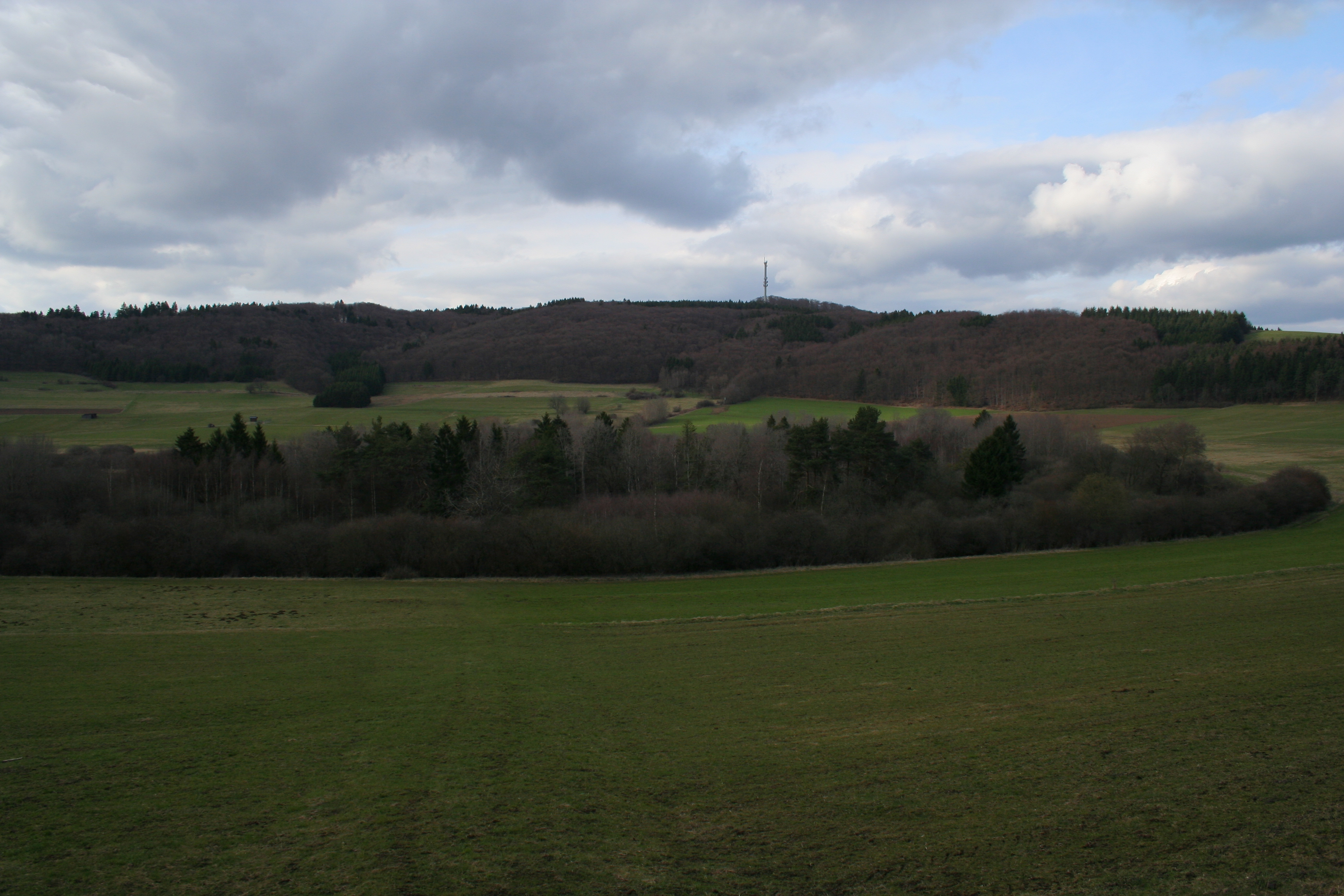 Blick auf den Mosbrucher Weiher in der Vulkaneifel